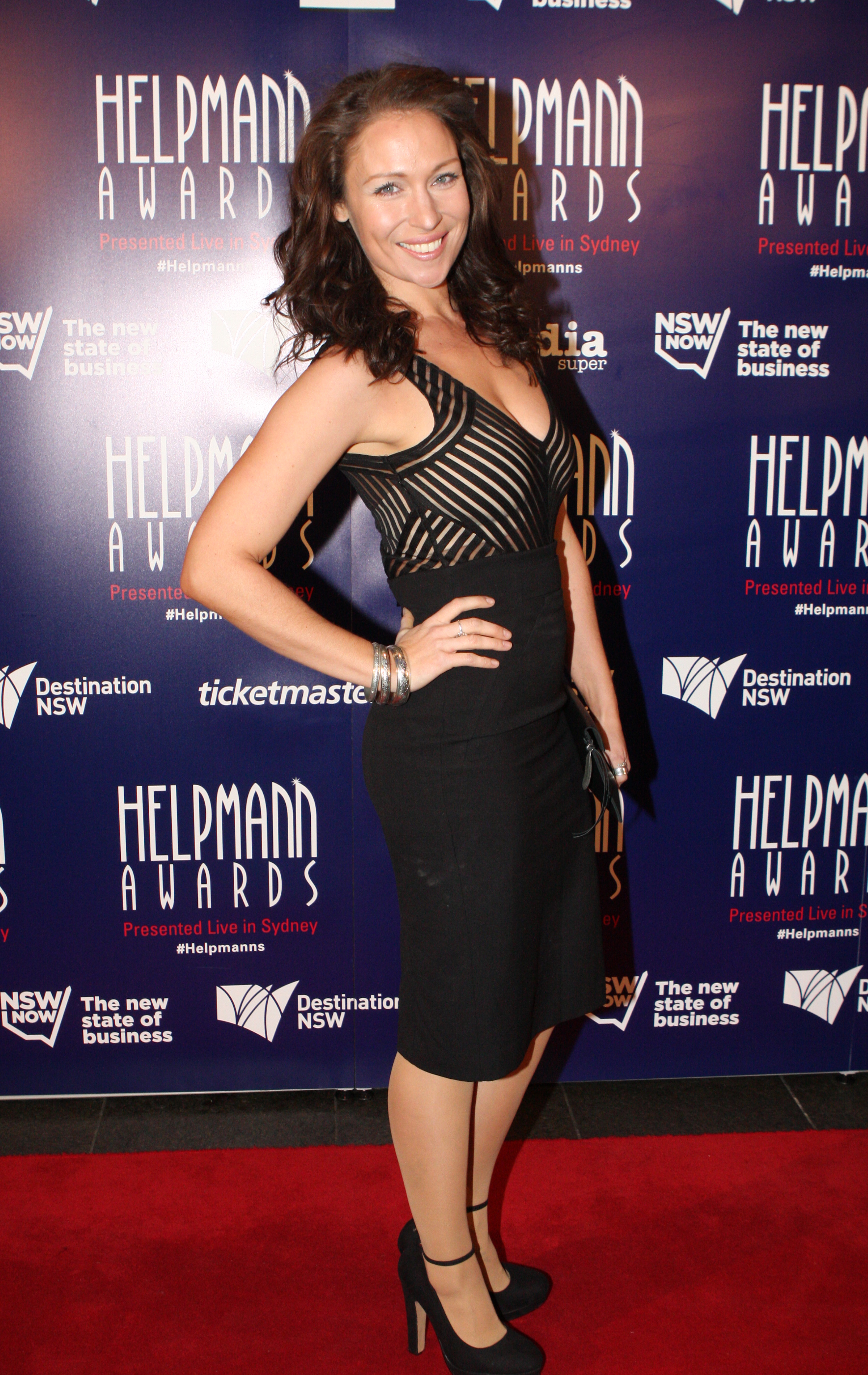 Lisa Gormley